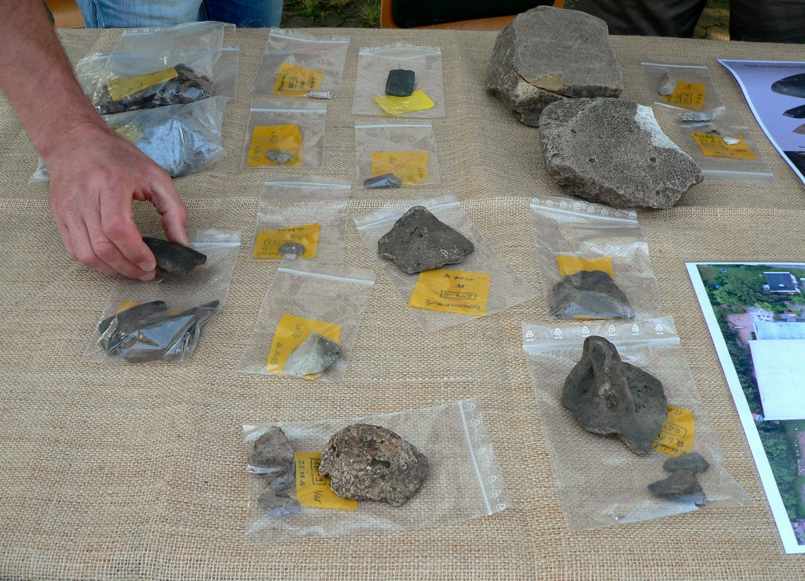 Fundstücke der Siedlung Rosdorf Mühlengrund